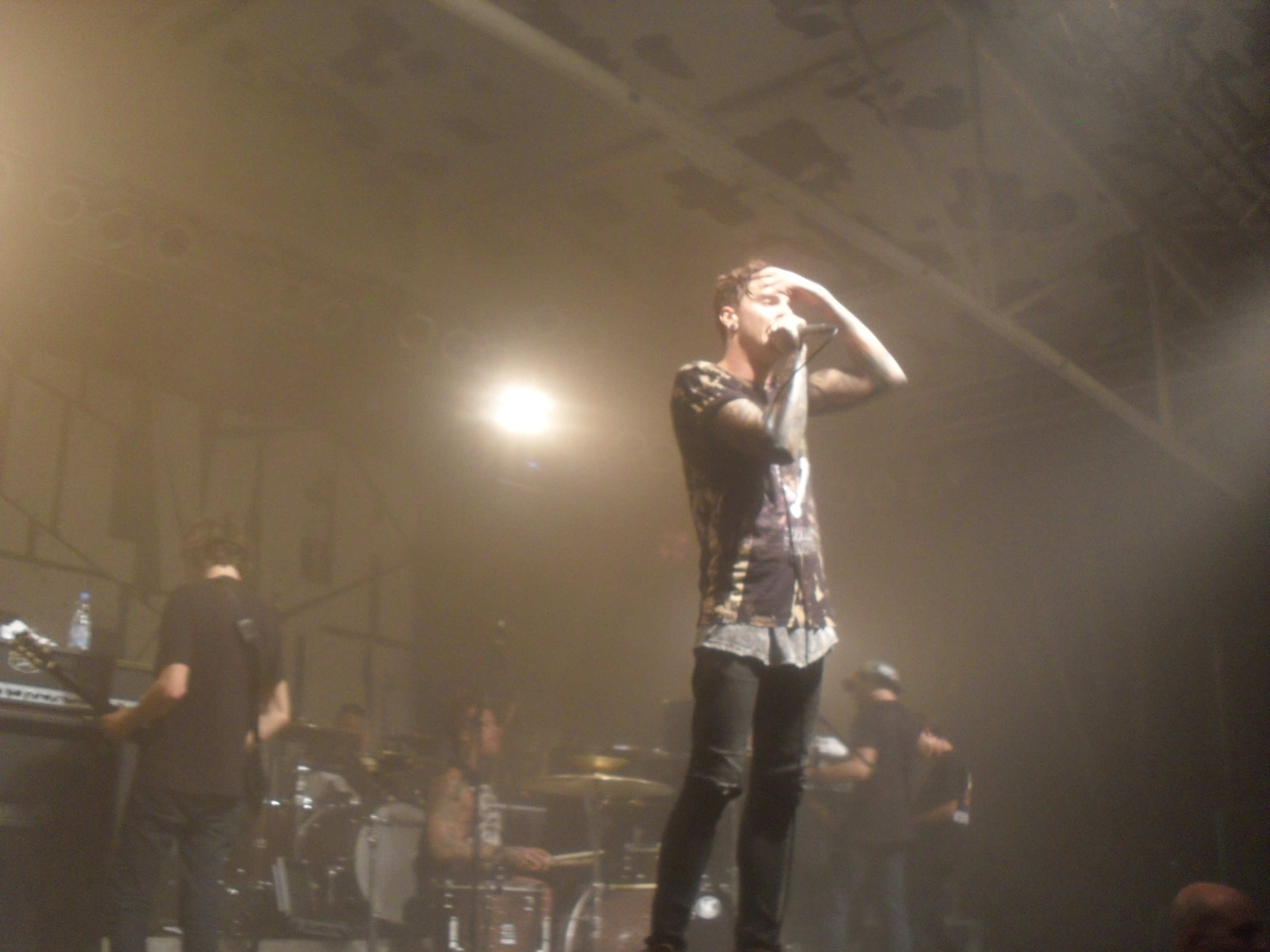 Dream On in der Essigfabrik in Köln, 2013.